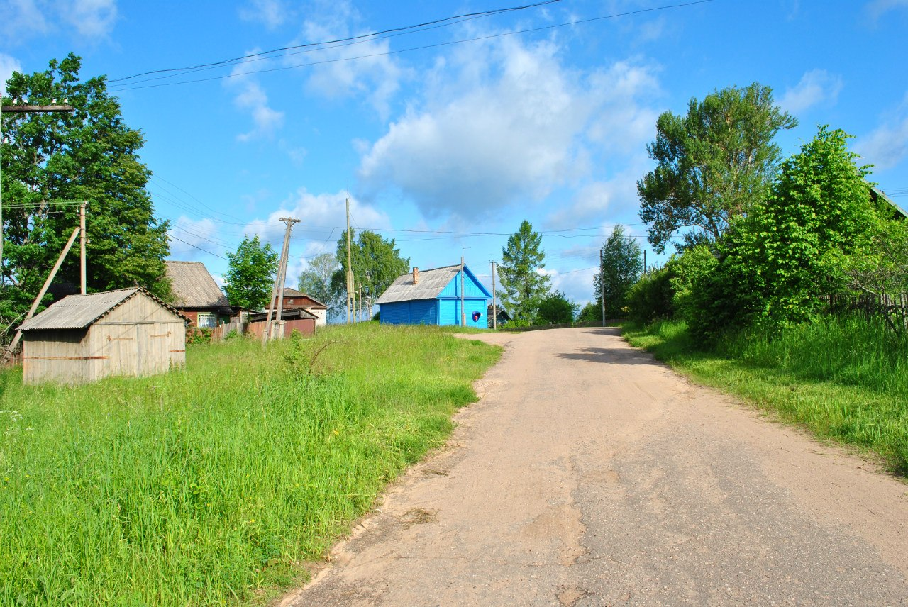 Псковская область Невельский район Голубоозёрская волость Красный Посёлок